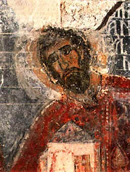 le roi Radoslav de Serbie.